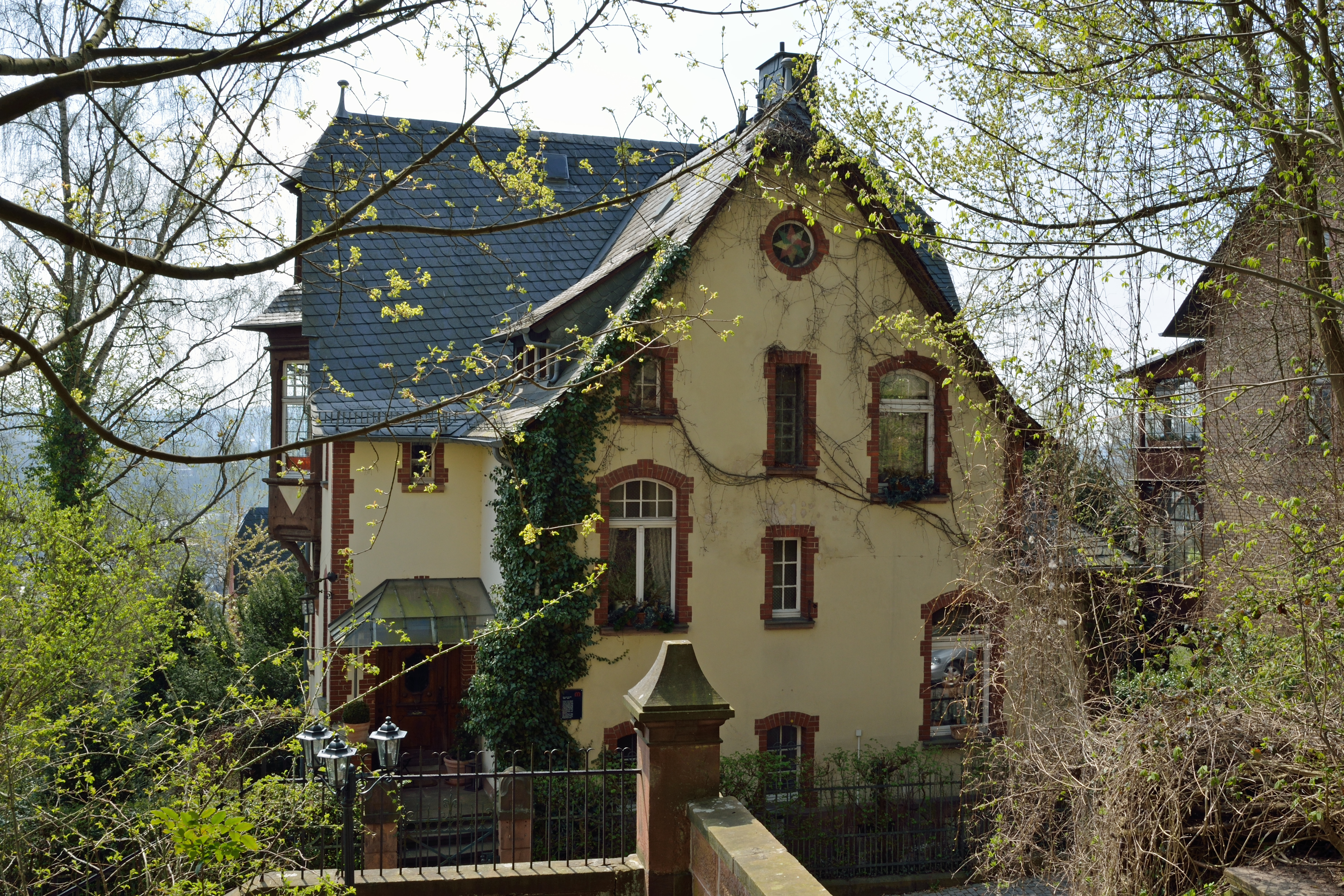 Hannah Arendts kurzzeitiges Wohnhaus in Marburg, Lutherstr. 4